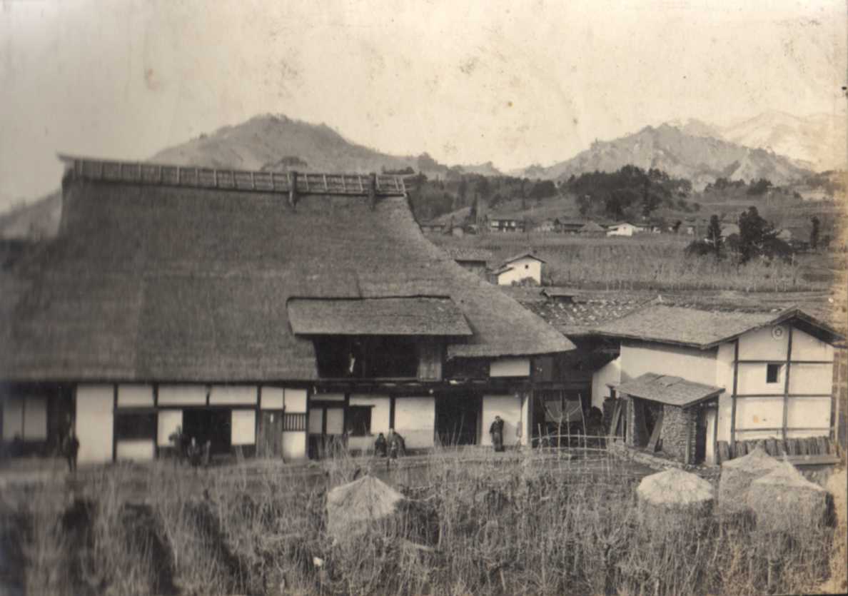 櫛淵宣根生家。天明1年(1781年)7月16日建立。大正10年の上越線(上越南線)開通により移築。